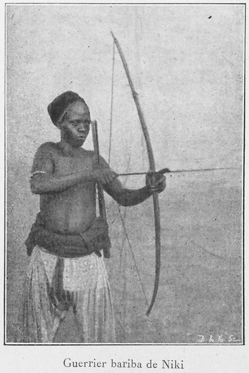 Guerrier bariba de Niki